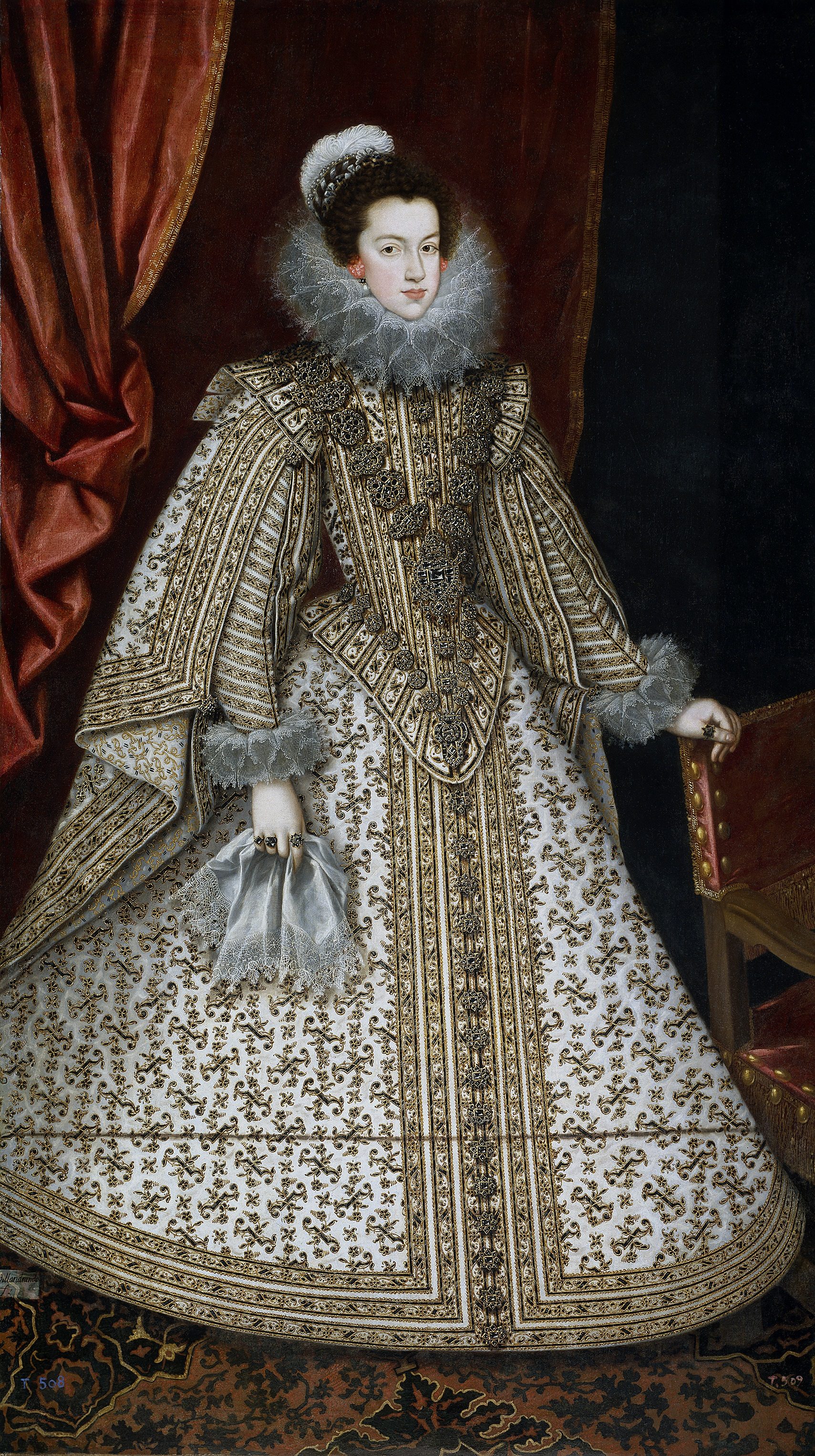 Retrato de Isabel de Borbón (1602-1644), que fue reina consorte de España por su matrimonio con el rey Felipe IV de España.